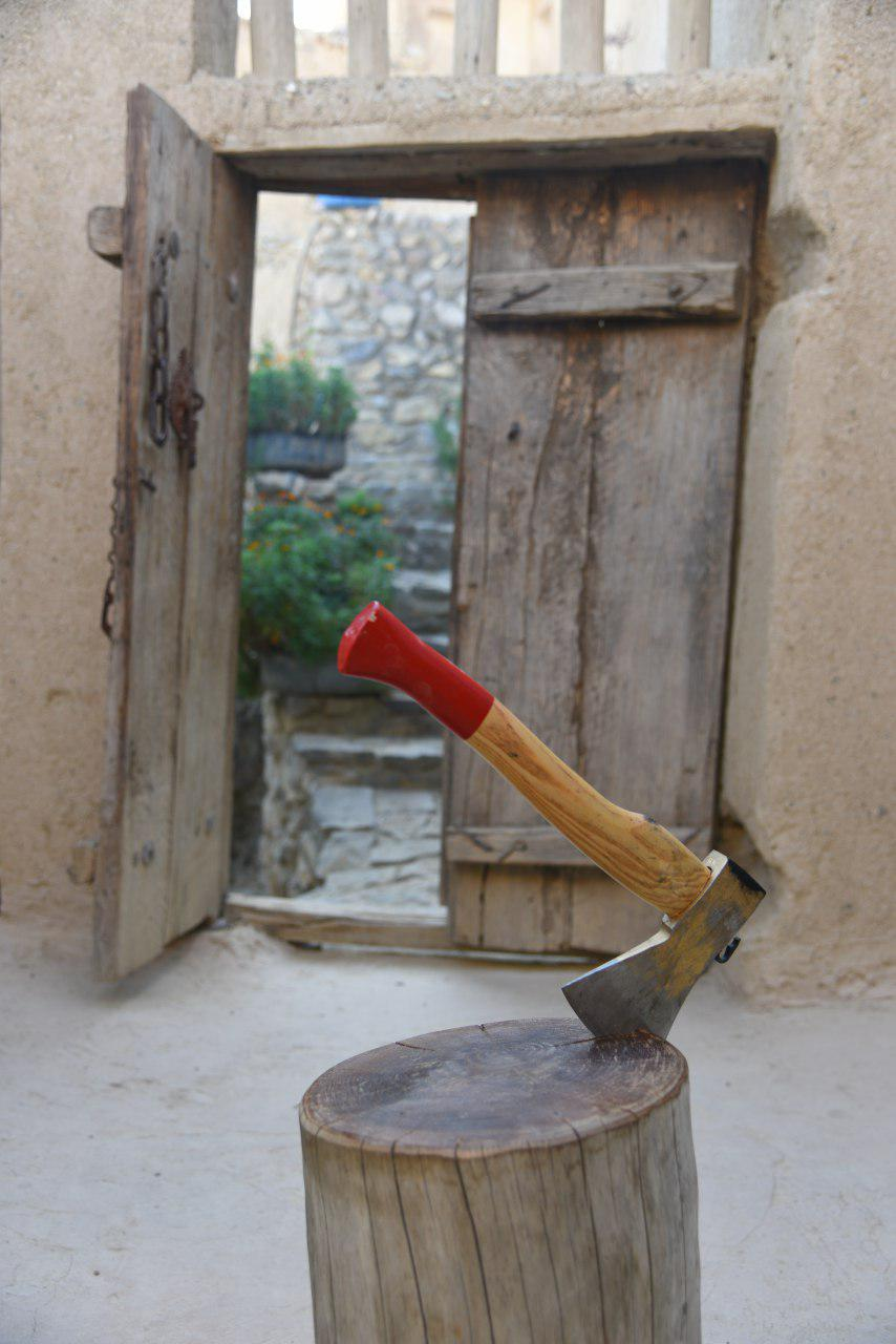 اقامتگاه بابانوروز در روستای قلعه بالا